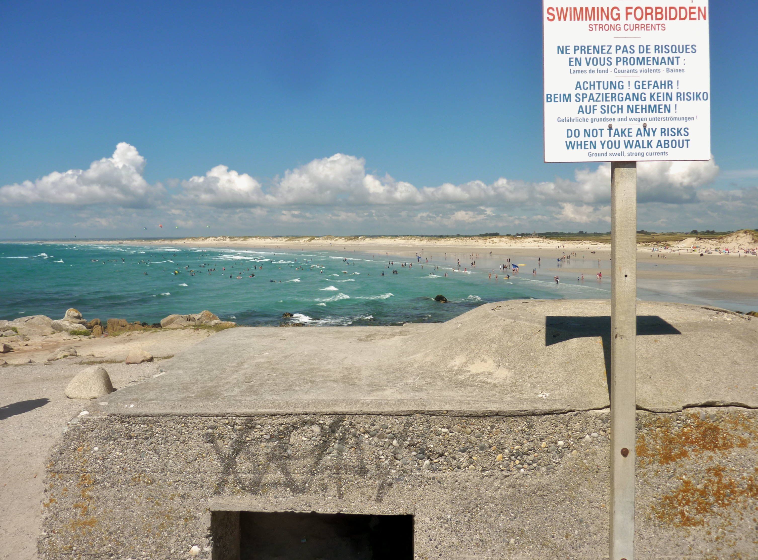 La plage de Tronoan vue de la Pointe de la Torche ; au premier plan, vue partielle d'un blockhaus